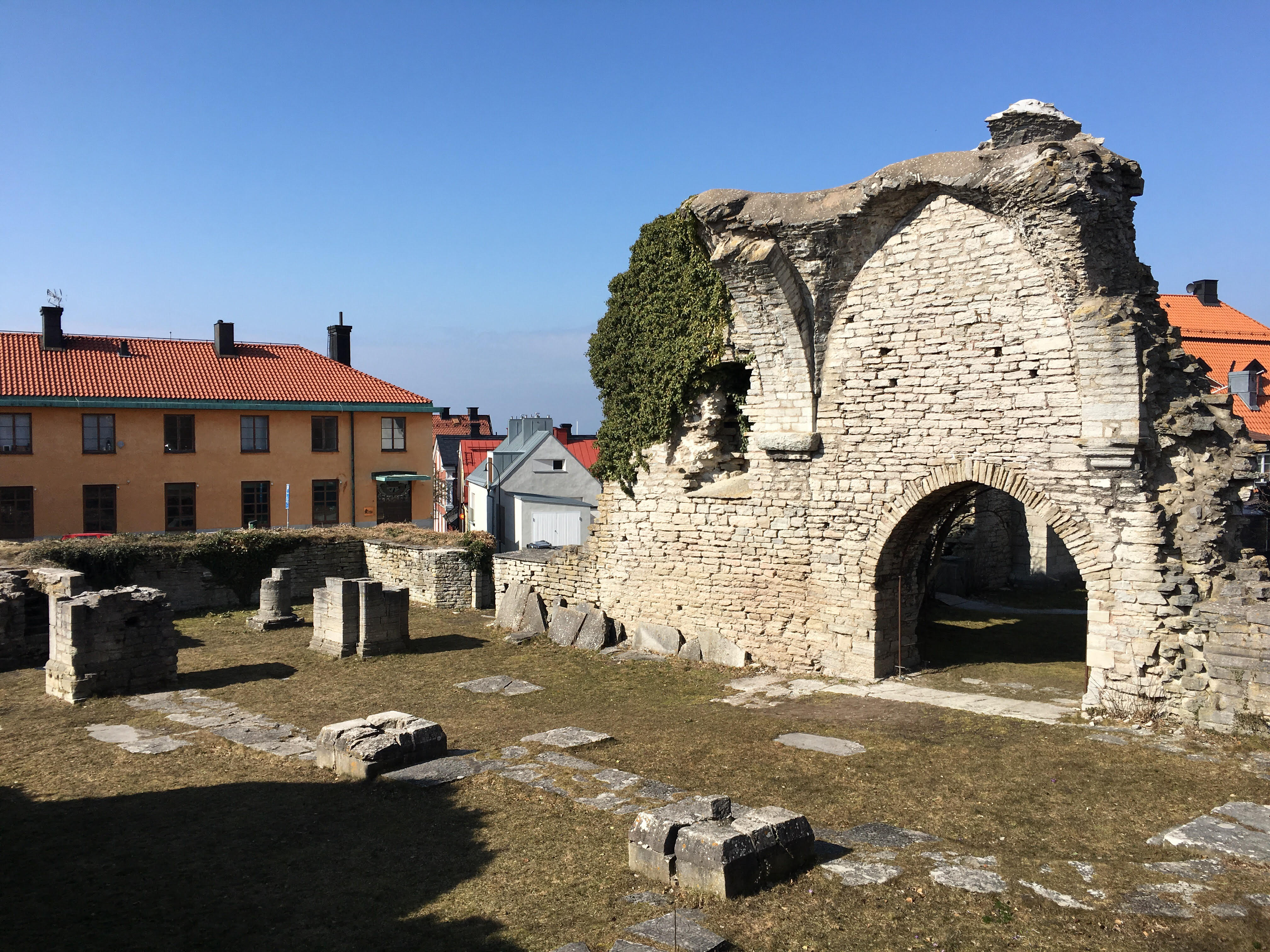 Sankt Pers ruin från Sankt Pers gränd. Visby, Gotland, Sverige.